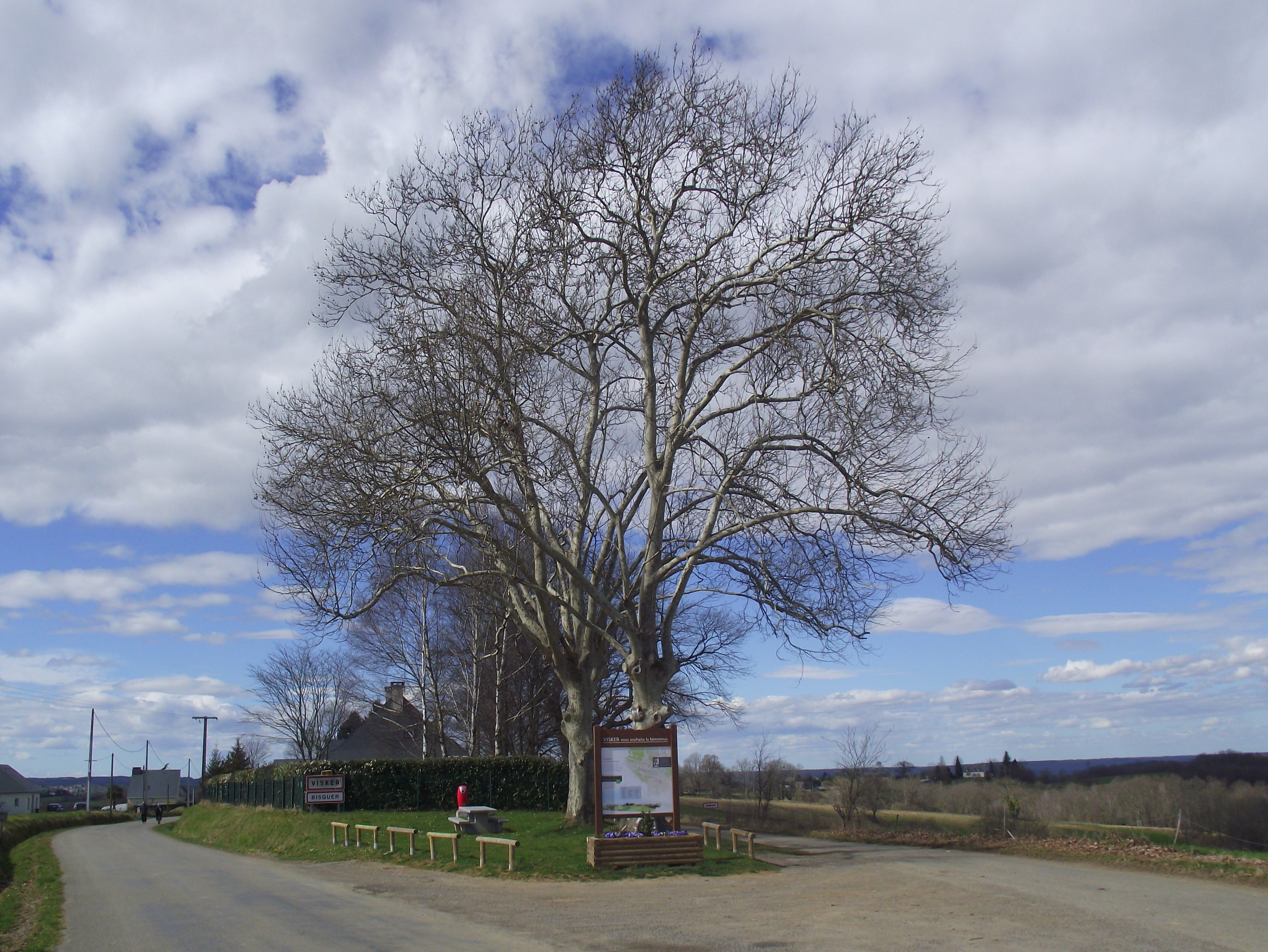 Platanes remplaçants du chêne de Visker (Hautes-Pyrénées, France)